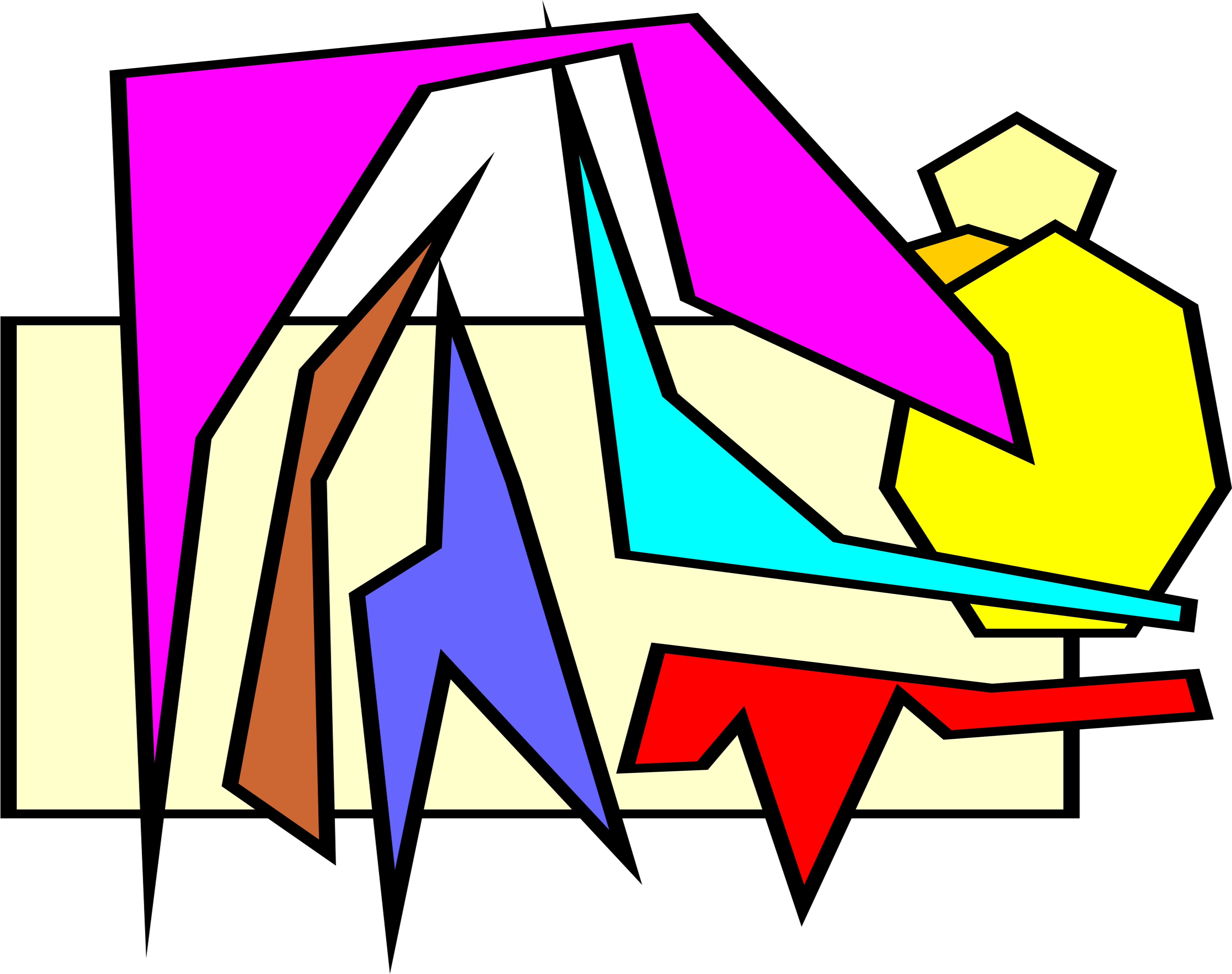 Das Bild zeigt ein Beispiel für einen 10-Farben-Holzschnitt (Computer-Aided Woodcut). Künstler: Joachim Feldmeier (← Wikipedia-Artikel mit weiteren Bildern des Grafikers).